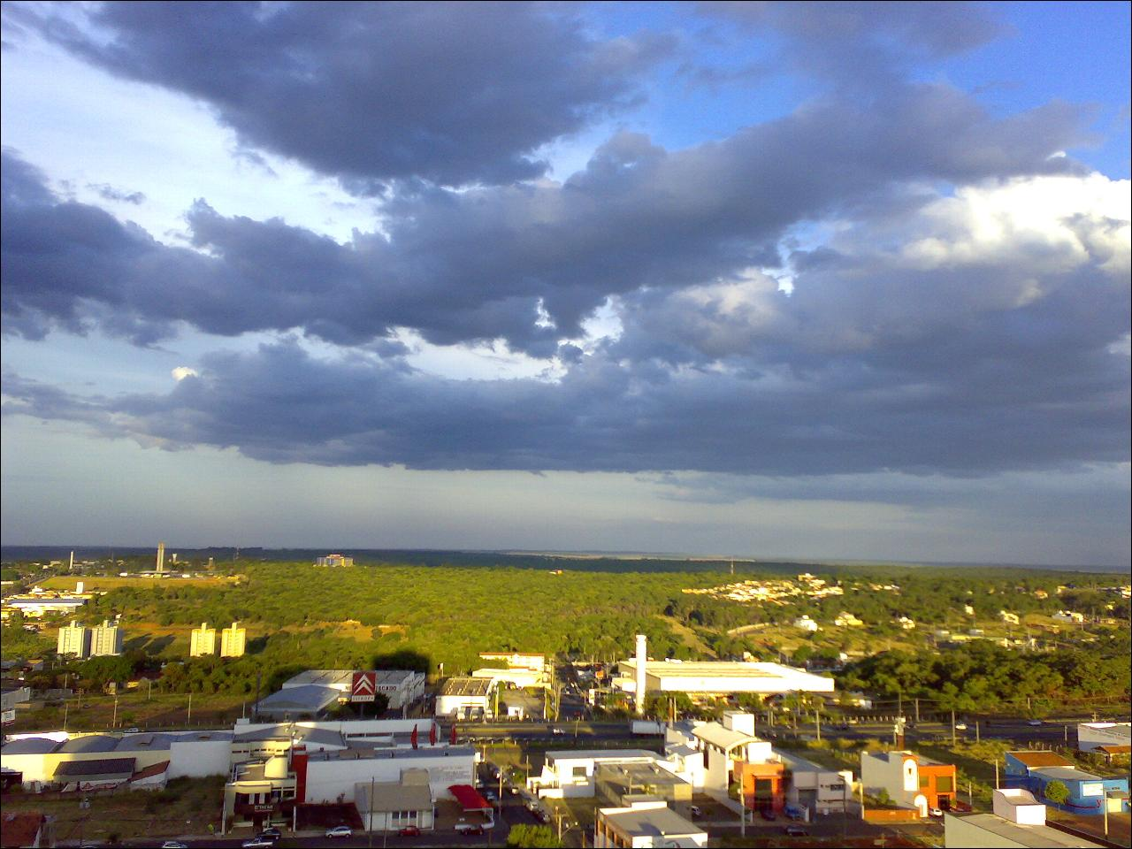 Céu de Bauru, São Paulo, Brasil.